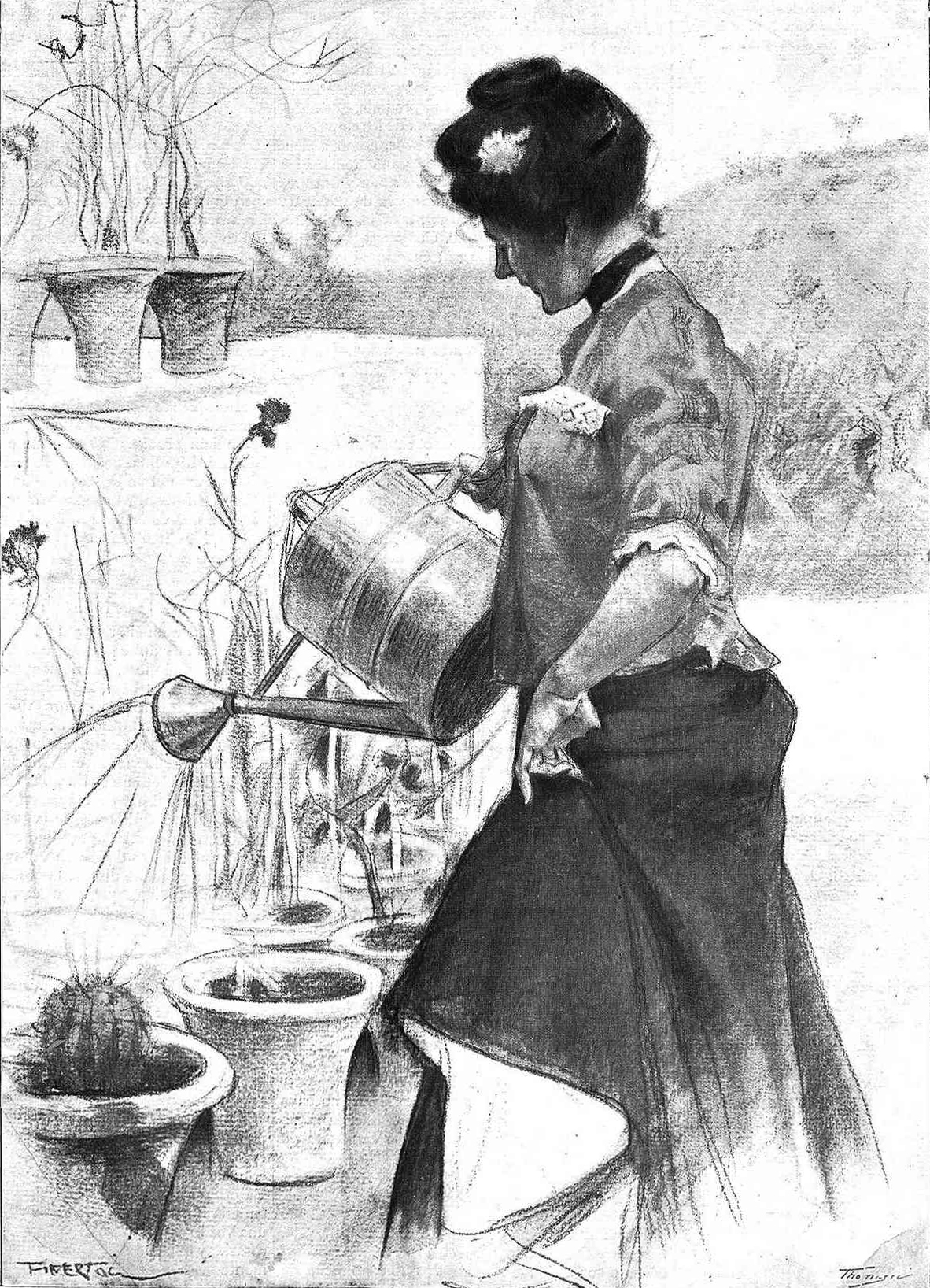 Los primeros claveles.